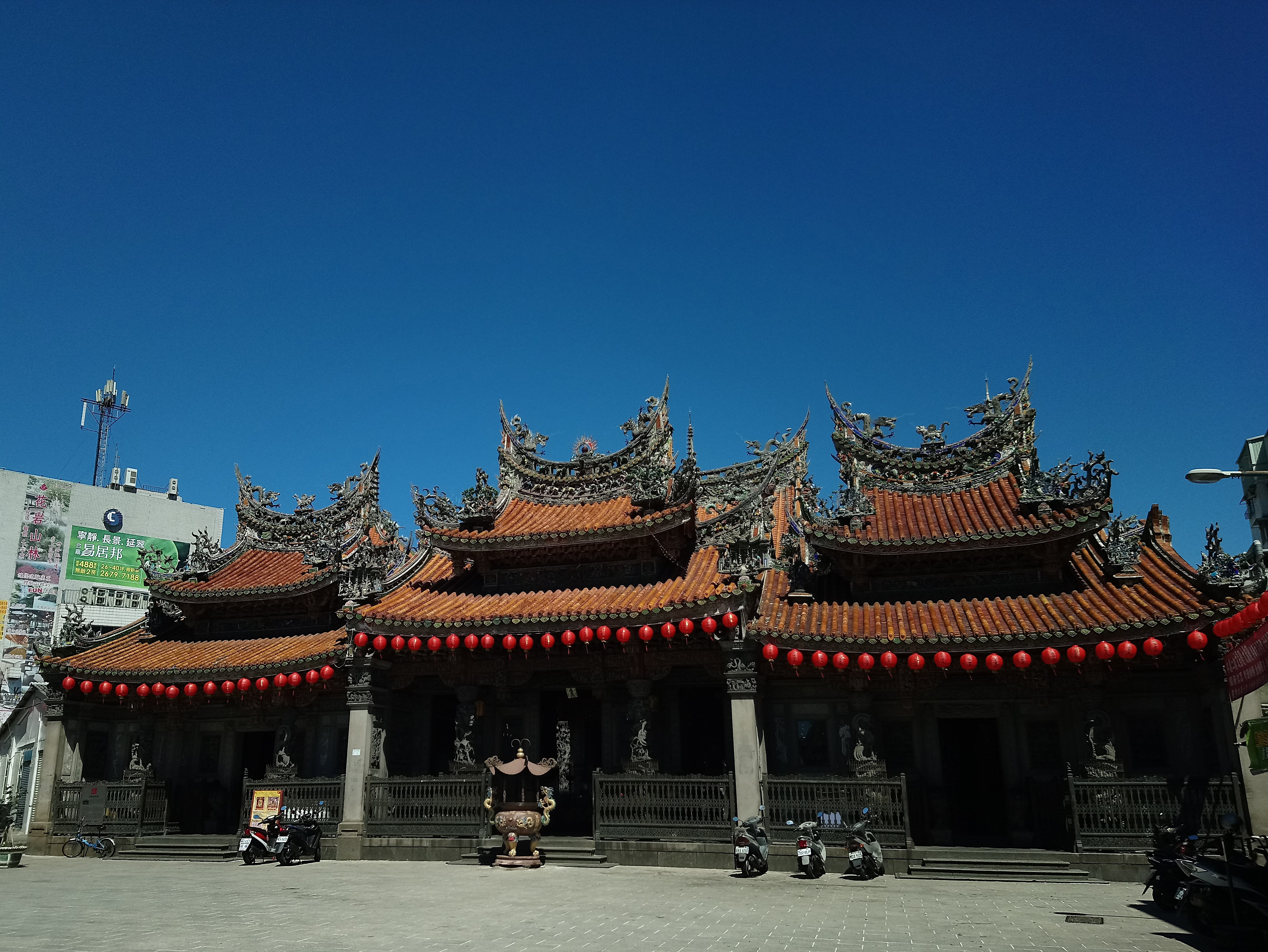 三峽長福巖,新北市三峽區秀川里